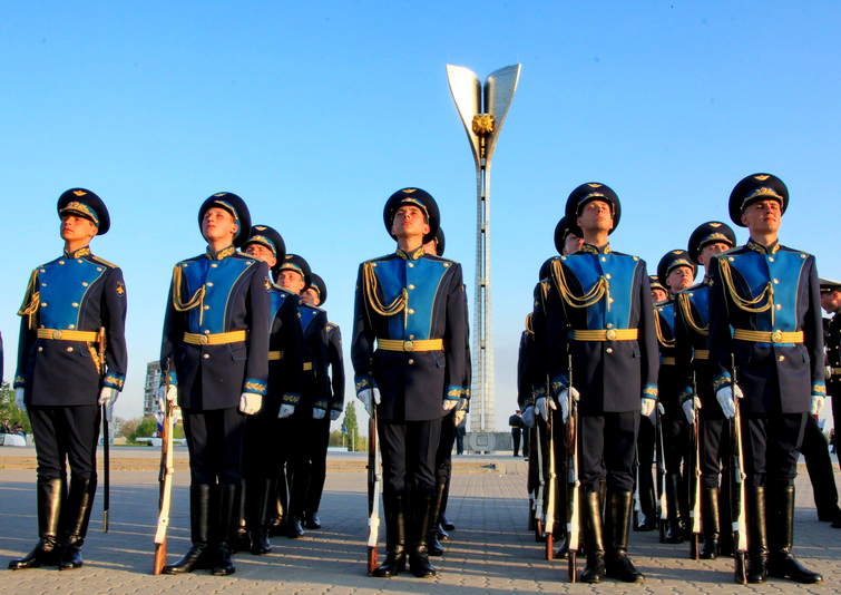 9 МАЯ 2013 (Ростов-на-Дону)